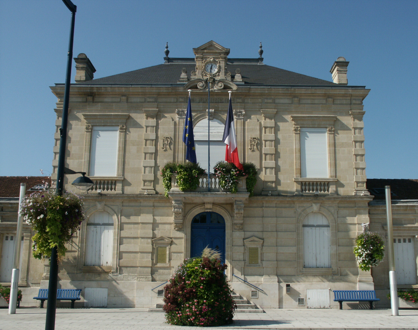 La mairie de Floirac (Gironde, France)